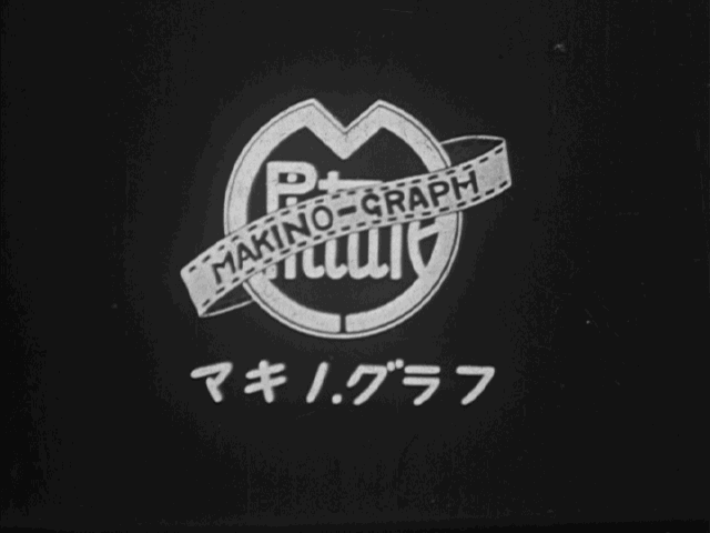 「マキノグラフ」、タイトル、1930年